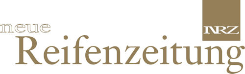 Logo der Neuen Reifenzeitung